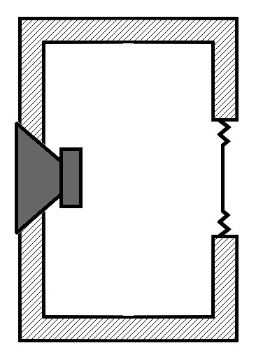 Croquis d'une enceinte à radiateur passif